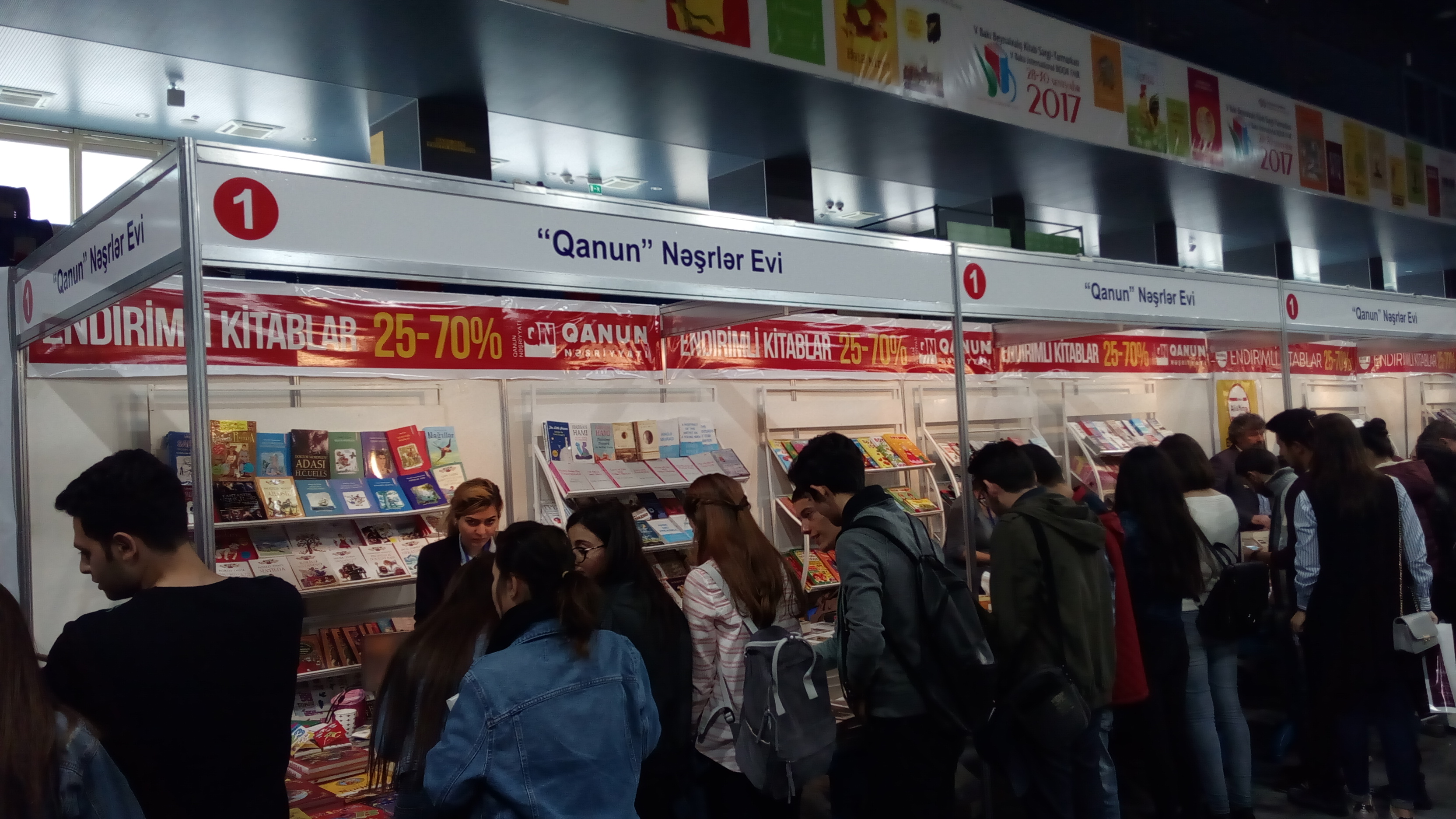 V Bakı Beynəlxalq Kitab Sərgi-Yarmarkası